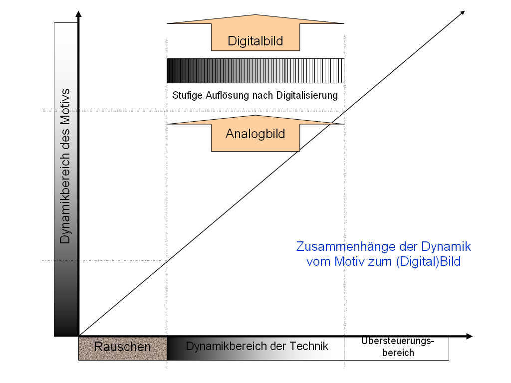 Hardcopy einer Powerpointfolie zum Dynamikzusammenhang Motiv und Bild